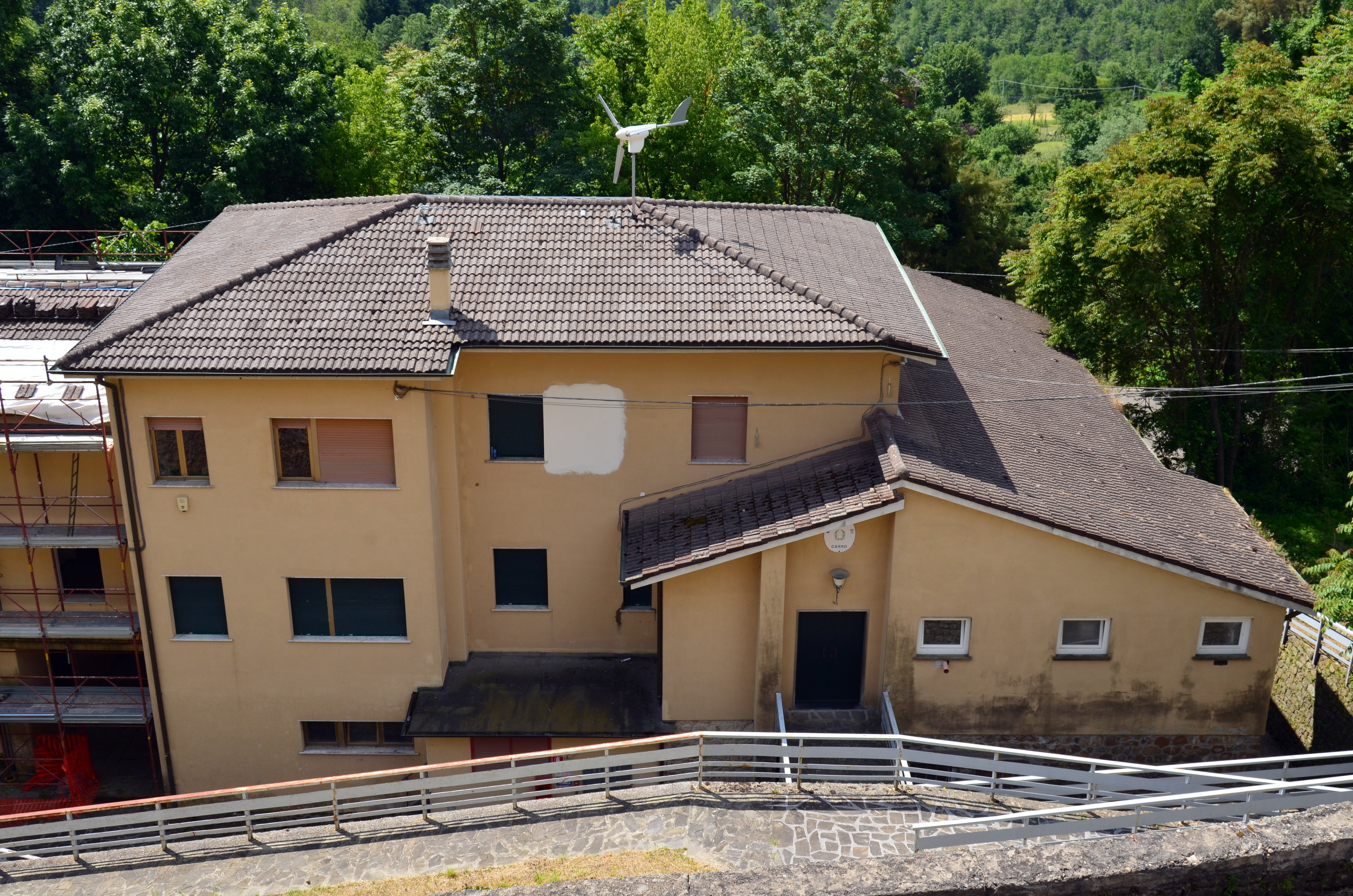 Serie di immagini del centro storico di Carro, Liguria, Italia